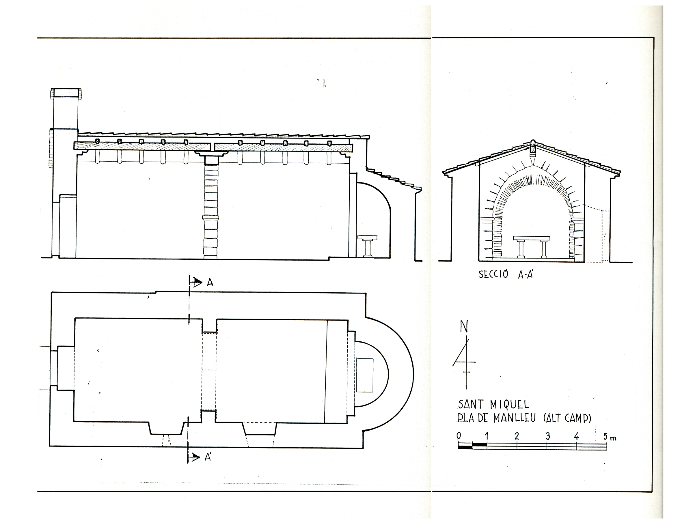 Selma. Capella de Sant Miquel del Pla de Manlleu. Planta i seccions. Dib. J. Fuguet.